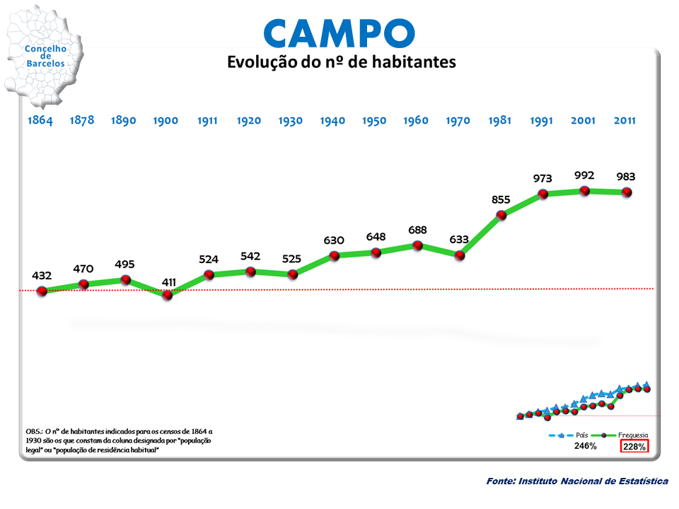 Censos 1864/2011